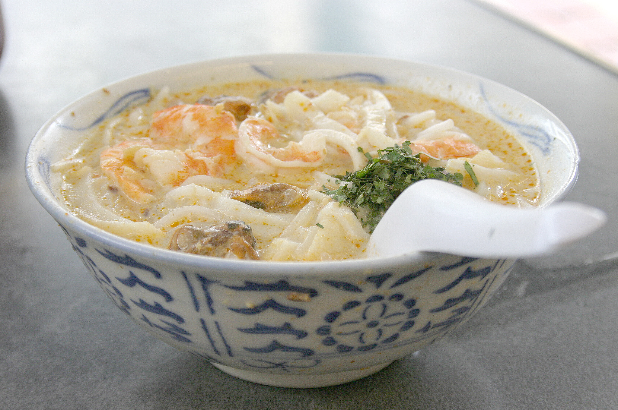 A bowl of Katong Laksa, Singapore